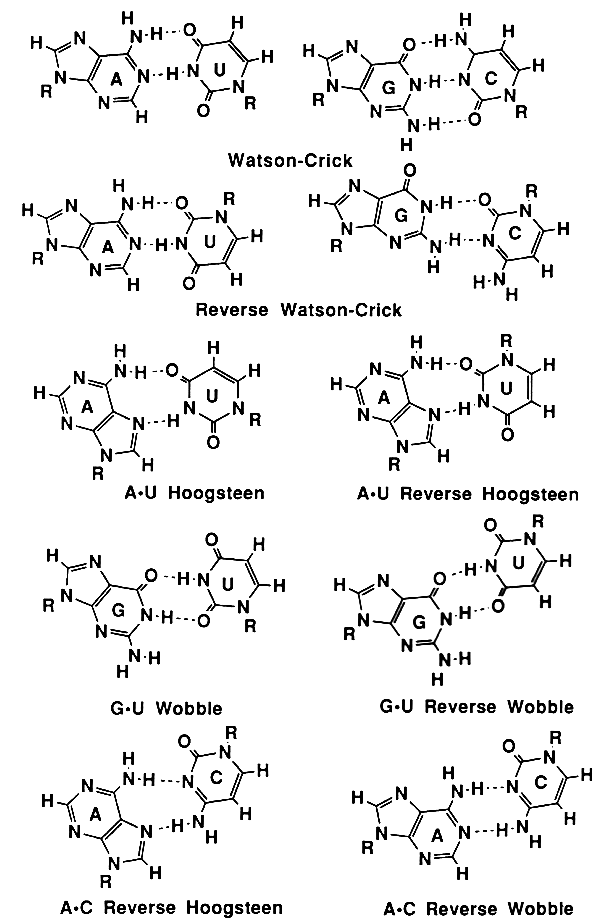 Watson-Crick, Reverse Watson-Crick, Hoogsteen, Reverse Hoogsteen, Wobble, Reverse Wobble: the ten possible purine-pyrimidine base pairs.